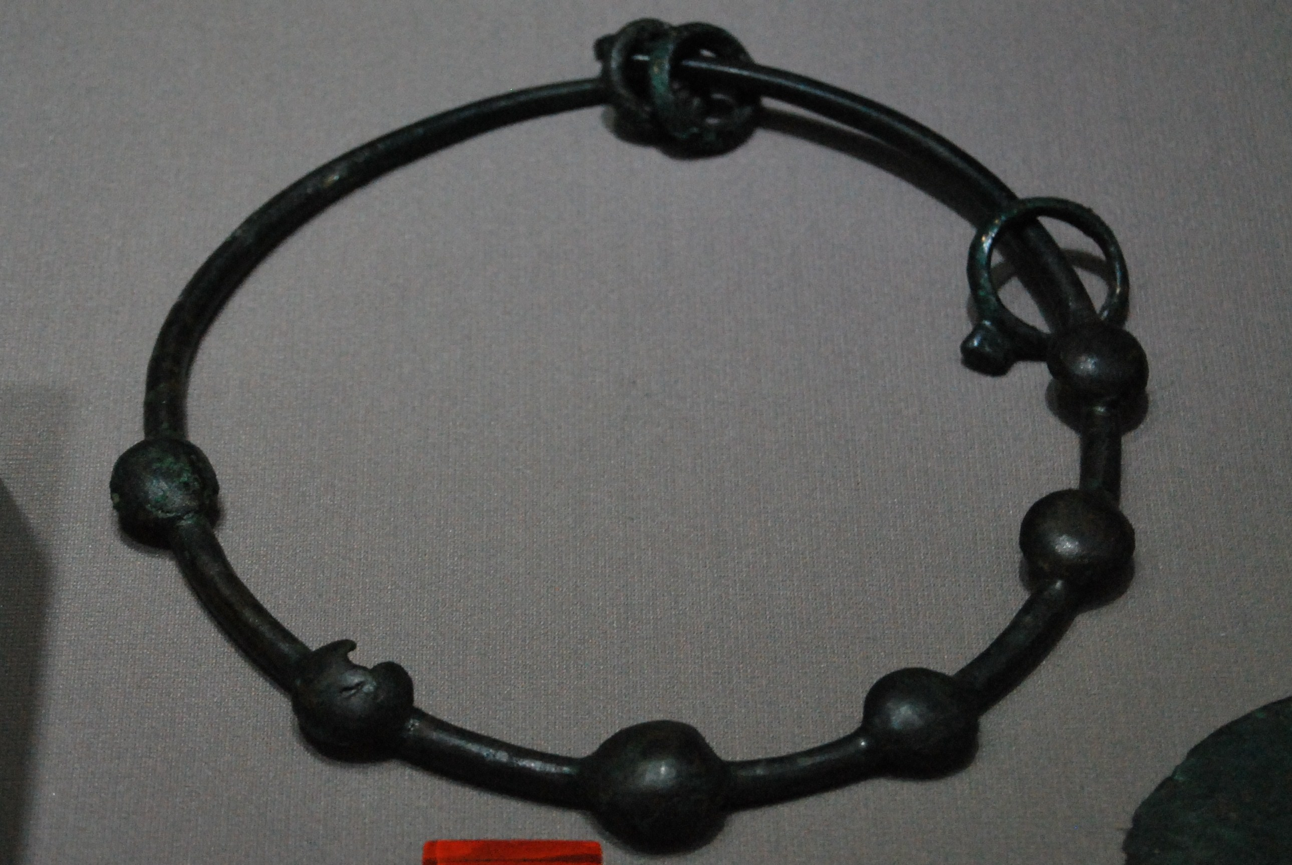 Torque de bronze trouvé à Coust (Cher - France) datant d'environ -580, actuellement exposé au Musée du Berry à Bourges.